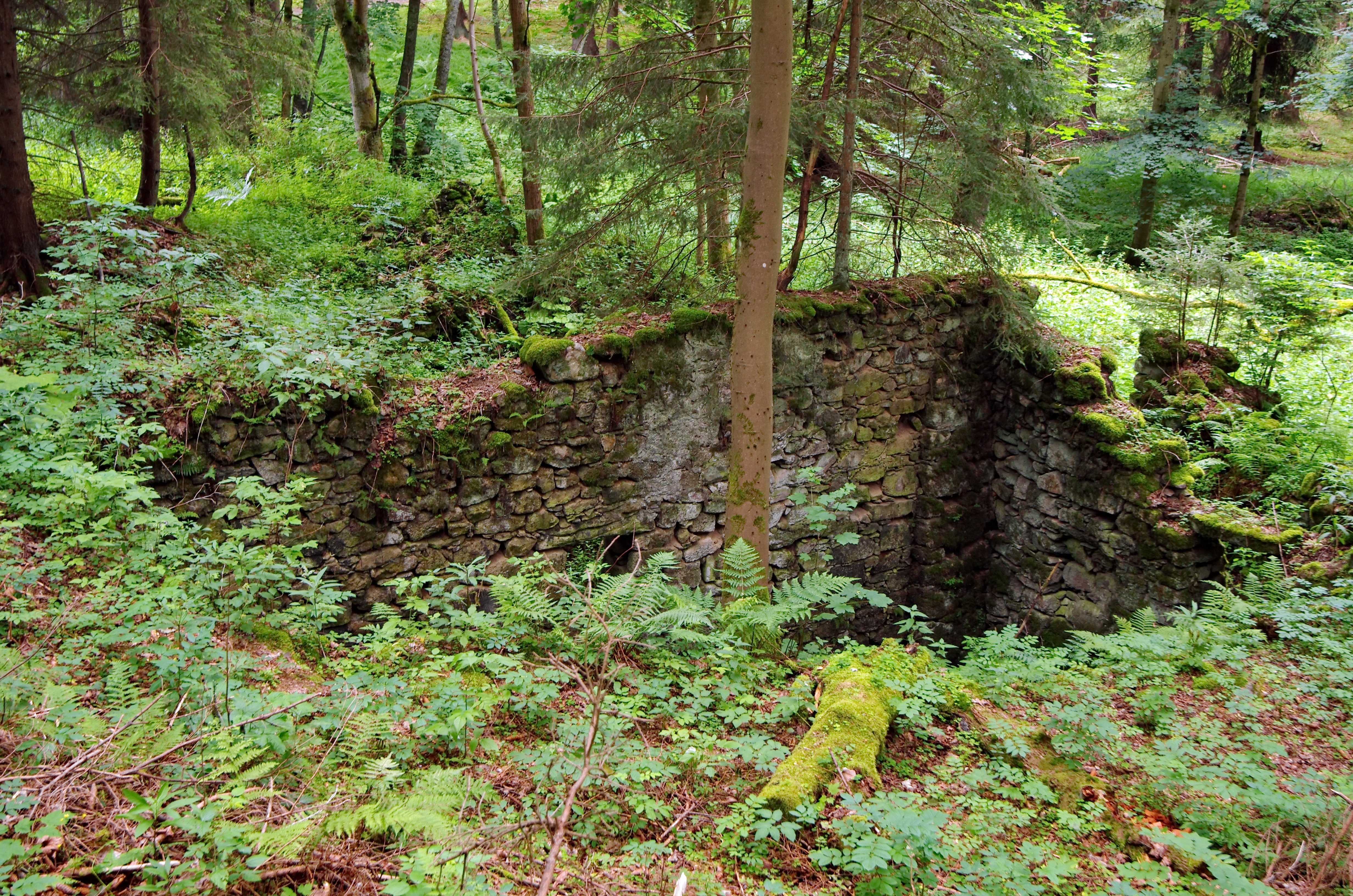 Pozůstatek starého mlýna na Dolském potoce (přítok Teplé), v místě nad zaniklou osadou Horní Hluboká, okres Sokolov